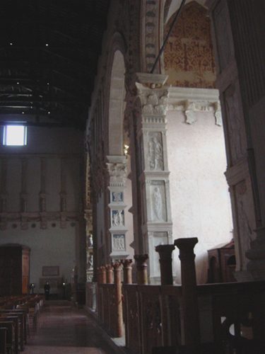 Tempio malatestiano di Rimini. Foto di Giovanni Dall'Orto, aprile 2004. Tempio malatestiano in Rimini. Picture by Giovanni Dall'Orto, april 2004.